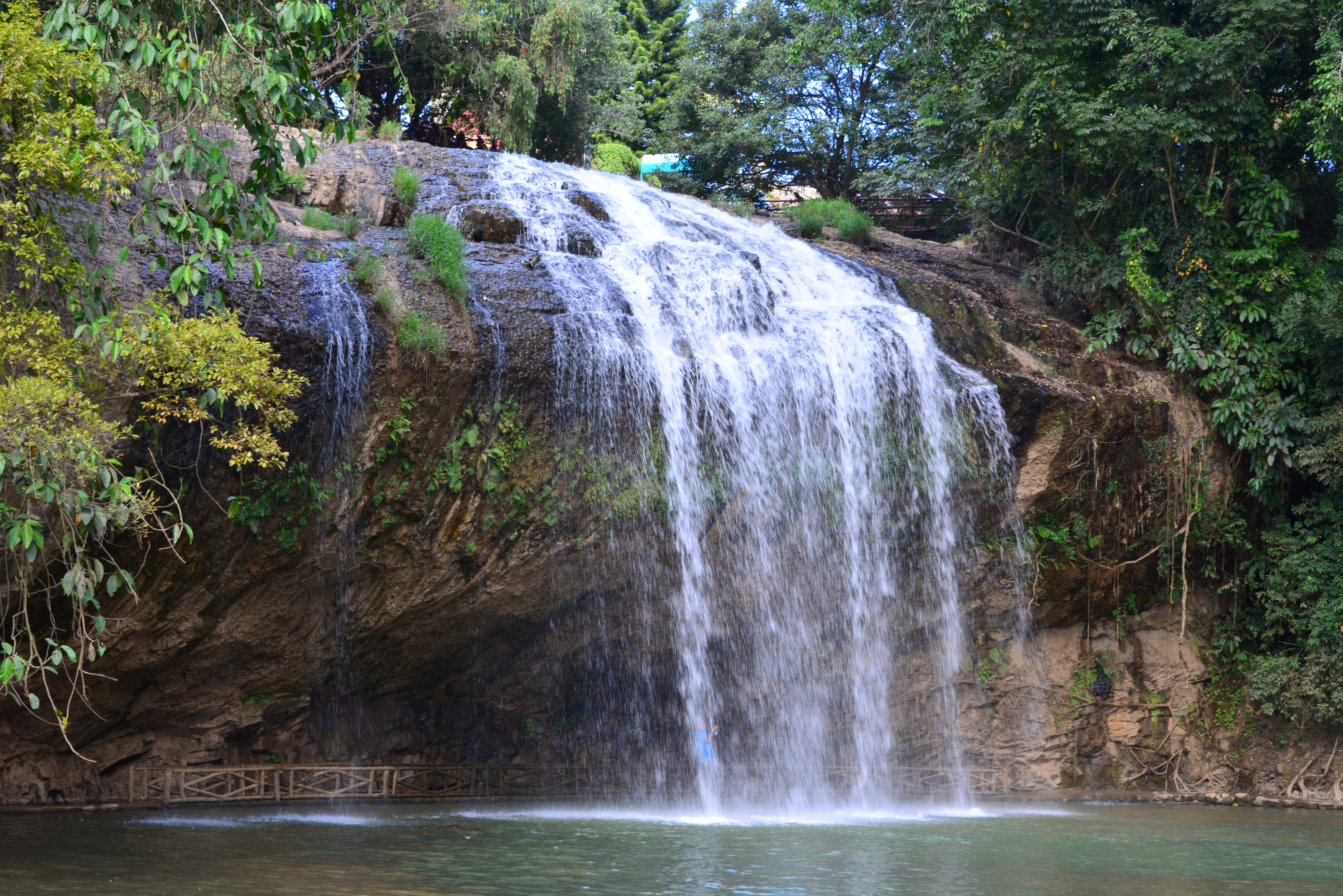 Vietnam